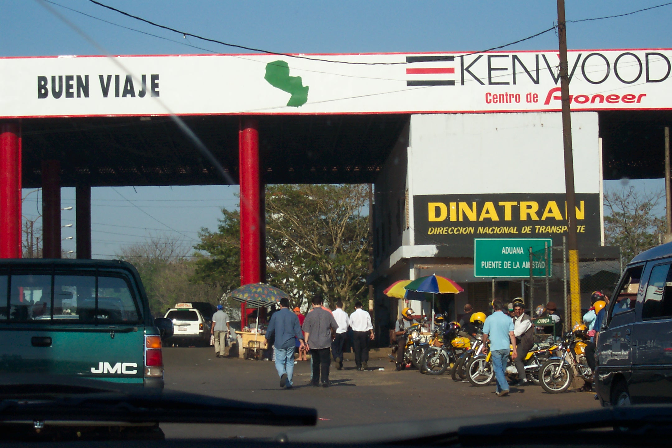 Aduana Paraguai-Brasil